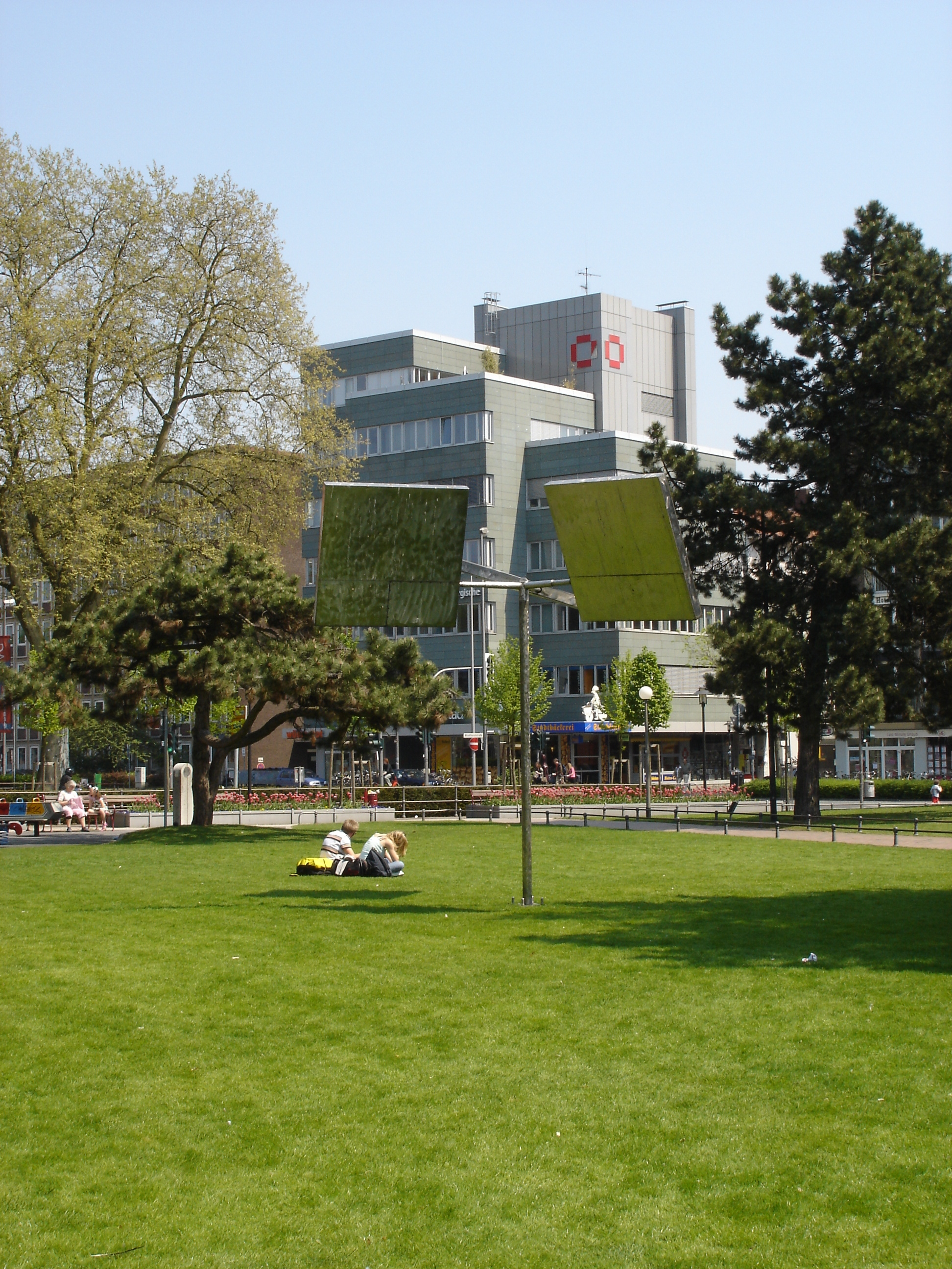 Skulptur Drei rotierende Quadrate von George Rickey aus dem Jahre 1973 auf der Engelenschanze an der Promenade in Münster, Westfalen, Deutschland